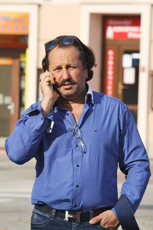 Miloslav Janulík na volebním mítinku v Břeclavi